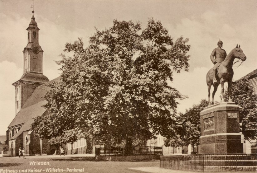 WRIEZEN - Kriegerdenkmal 1870/71 mit Kaiser Wilhelm I.-Reiterstandbild